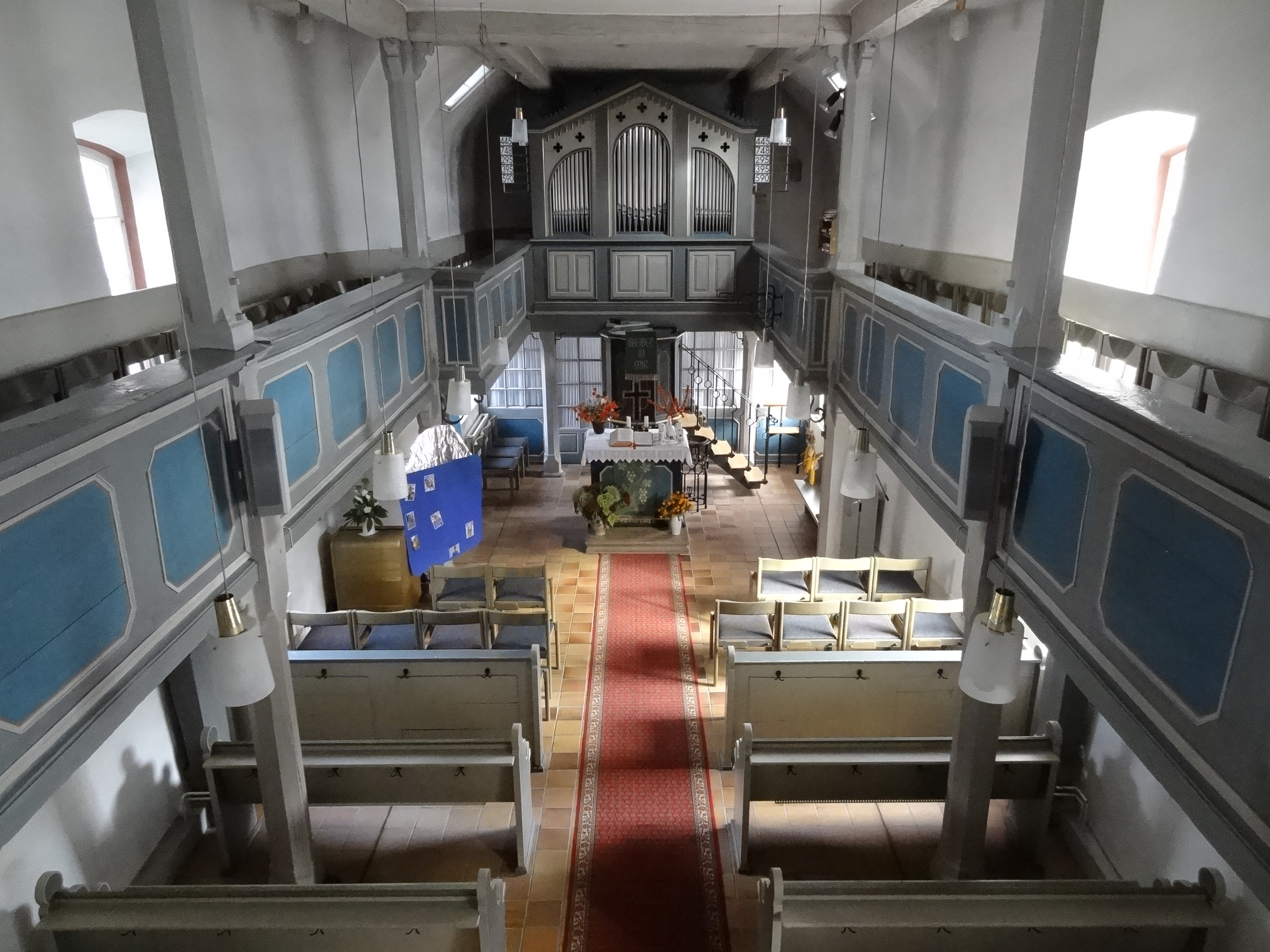 Blick nach Osten, evangelische Kirche Allendorf/Lahn